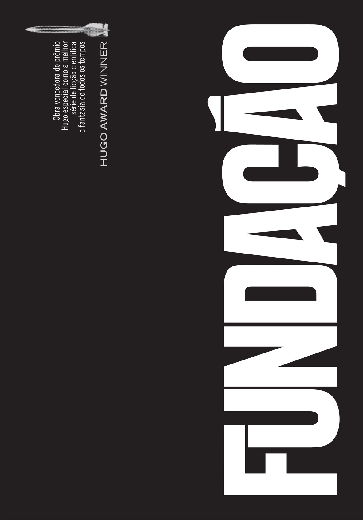 Capa da Série Fundação, escrita por Isaac Asimov